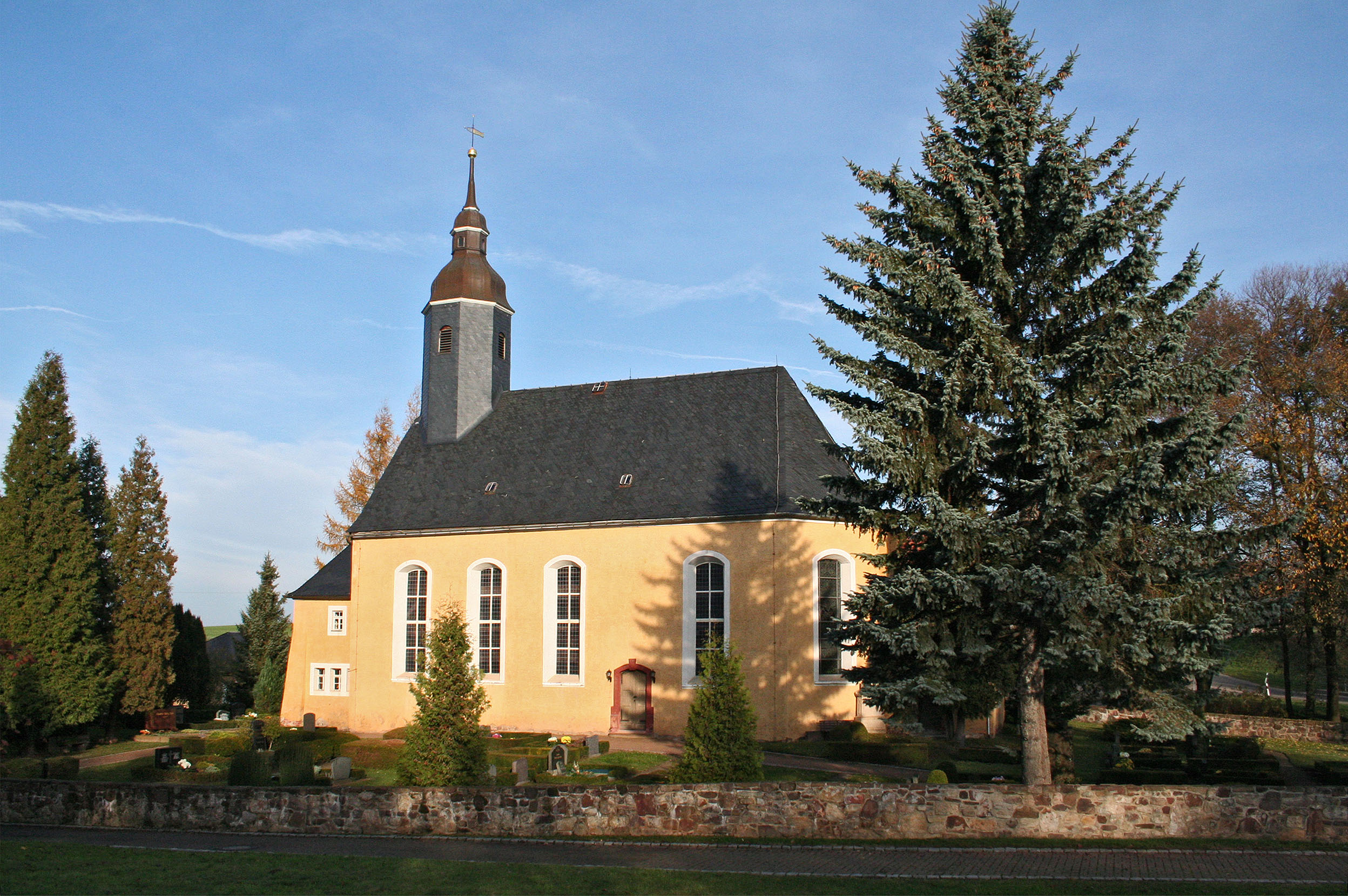 Kirche in Bockelwitz von Süden